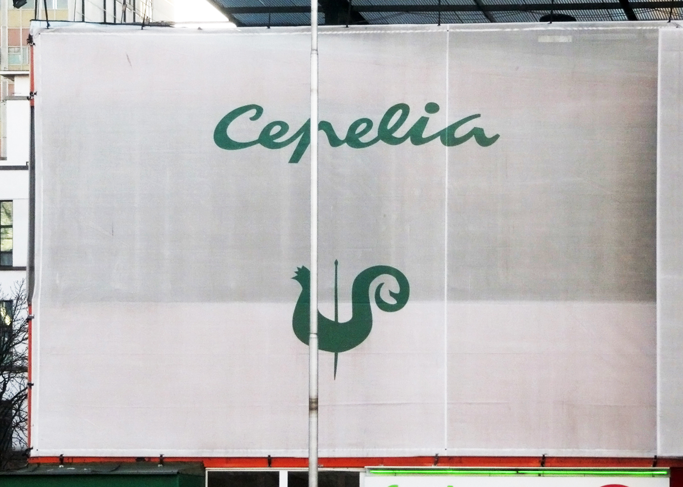 Cepelia-Logo im Stadtbild von Warschau